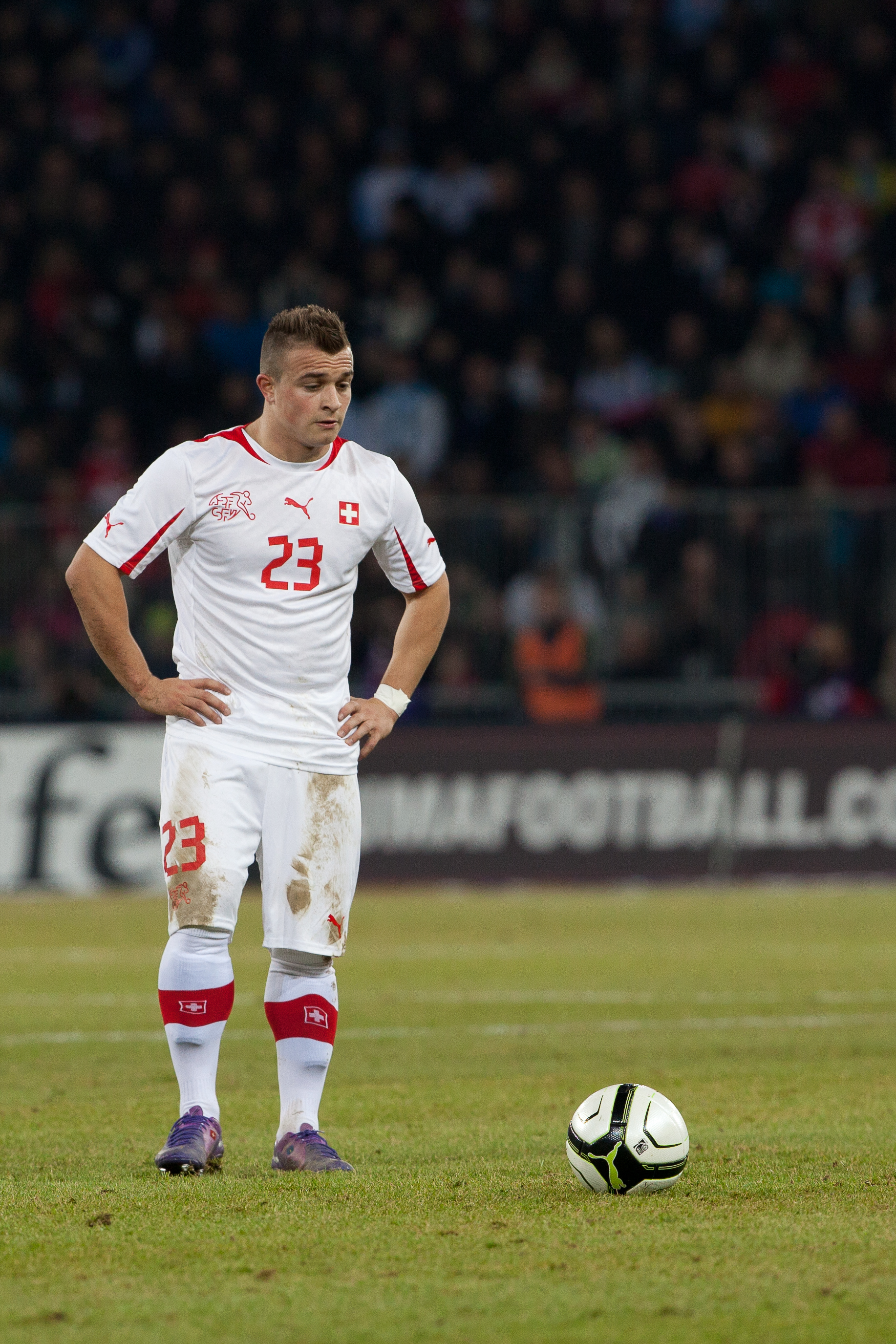 Xherdan Shaqiri